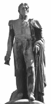 Statue de Benoît de Boigne disposée au sommet de la fontaine des éléphants à Chambéry. Le fond de l'image a été retouché afin de détourer la statue.